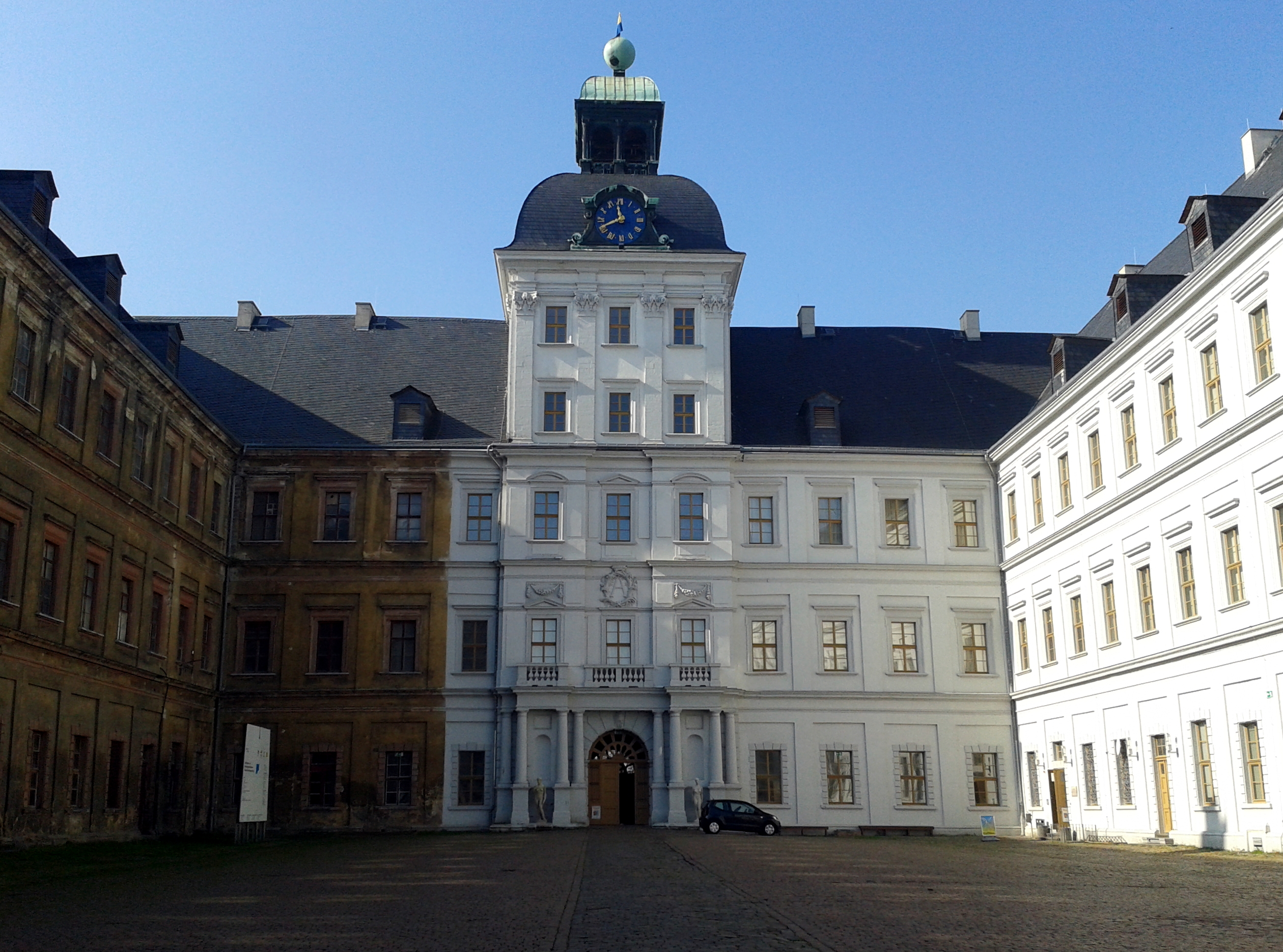 Schloss Neu-Augustusburg in Weißenfels